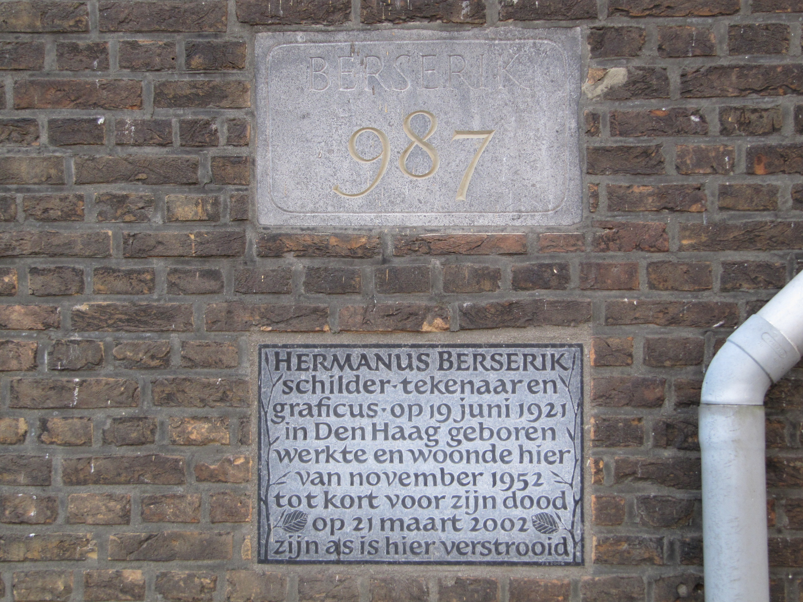 RM20082 Rijswijk - Van Vredenburchweg 985-987 (gedenkplaat).jpg